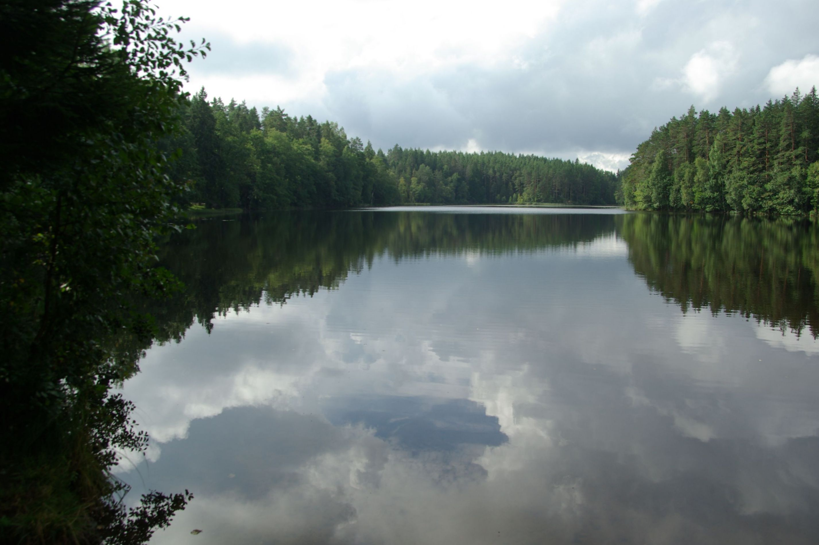 Pikkjärv, ka Järvi Pikkjärv, Järvi Pikajärv, Pühameeste Pikkjärv on Harjumaal, Kuusalu vallas Suru küla lähedal asuv looduslik järv.